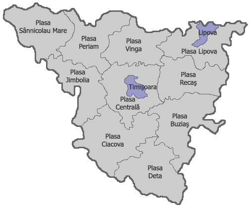 Harta judeţului Timiş-Torontal în 1930, cu împărţirea teritorial-administrativă pe plăşi.